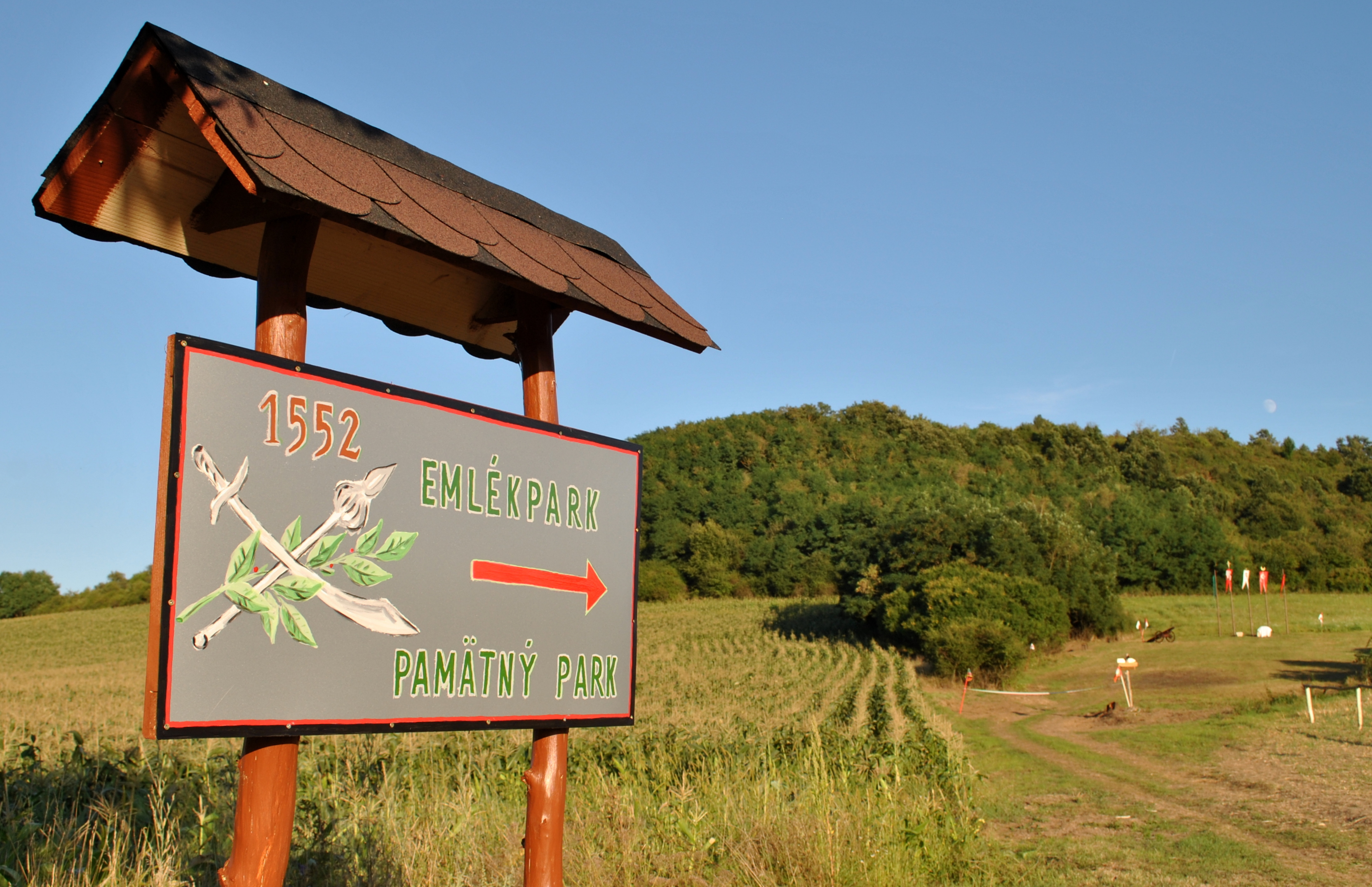 A palásti csata emlékére létrehozott 1552-es Emlékpark avatása Paláston, 2016.8.14-én